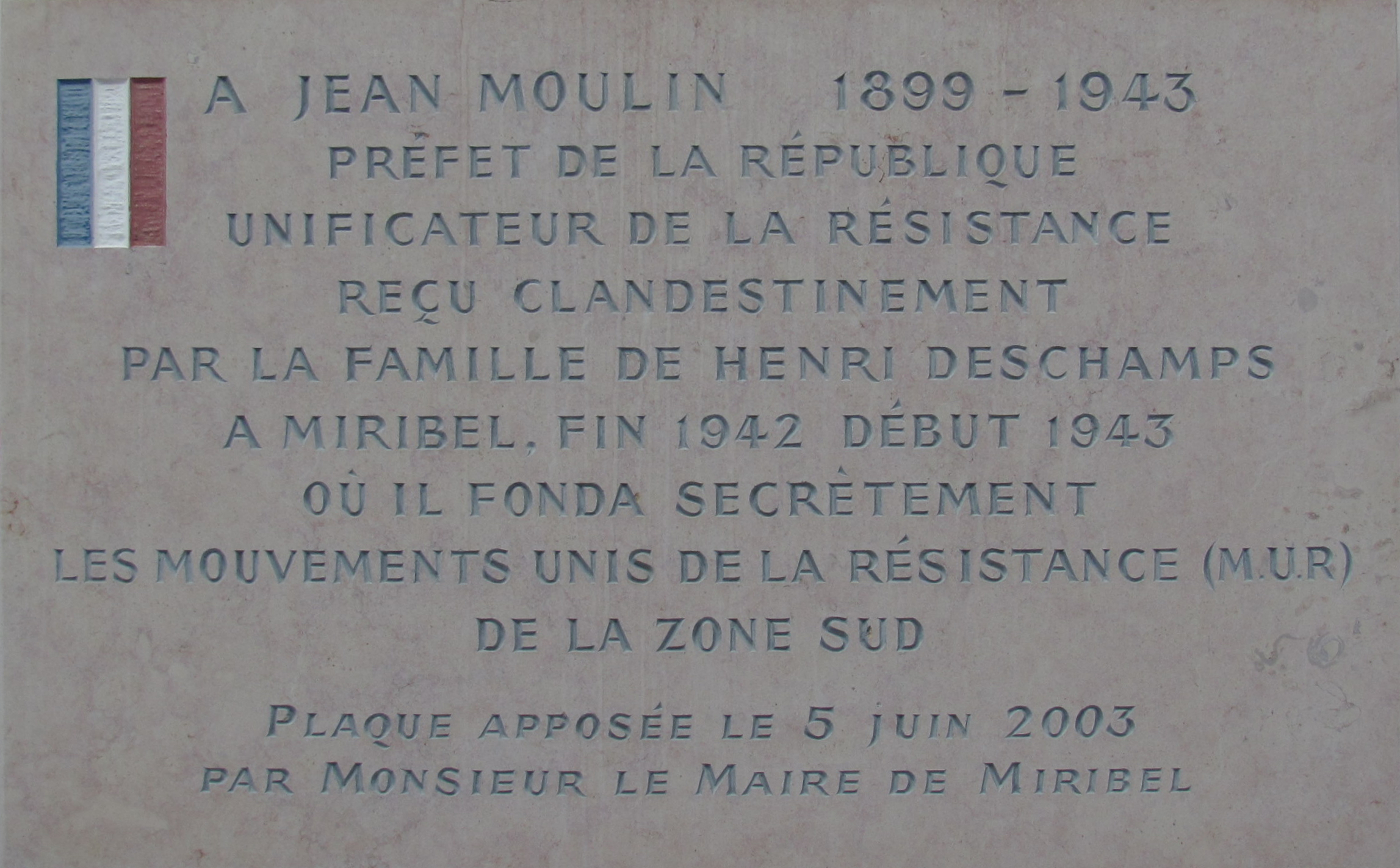 Plaque à Miribel, place Jean-Moulin, dans l'Ain, rendant hommage à Jean Moulin et à Henri Deschamps ; création des Mouvements Unis de Résistance. Texte de la plaque A Jean Moulin (1899-1943), préfet de la république, unificateur de la Résistance, reçu clandestinement par la famille de Henri Deschamps à Miribel, fin 1942 début 1943, où il fonda les Mouvements unis de la Résistance (M.U.R) de la zone sud. Plaque apposée le 5 juin 2003 par Monsieur le maire de Miribel.